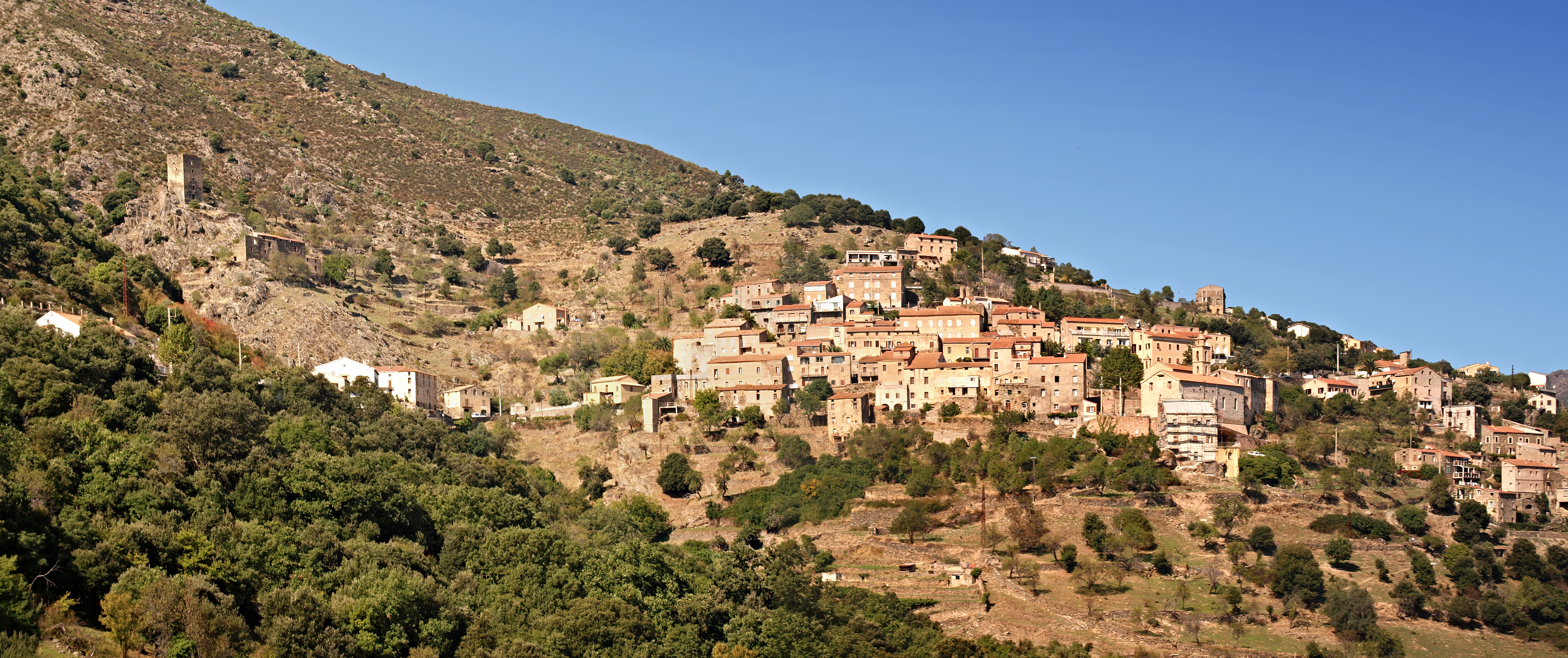 Castifao - Panorama